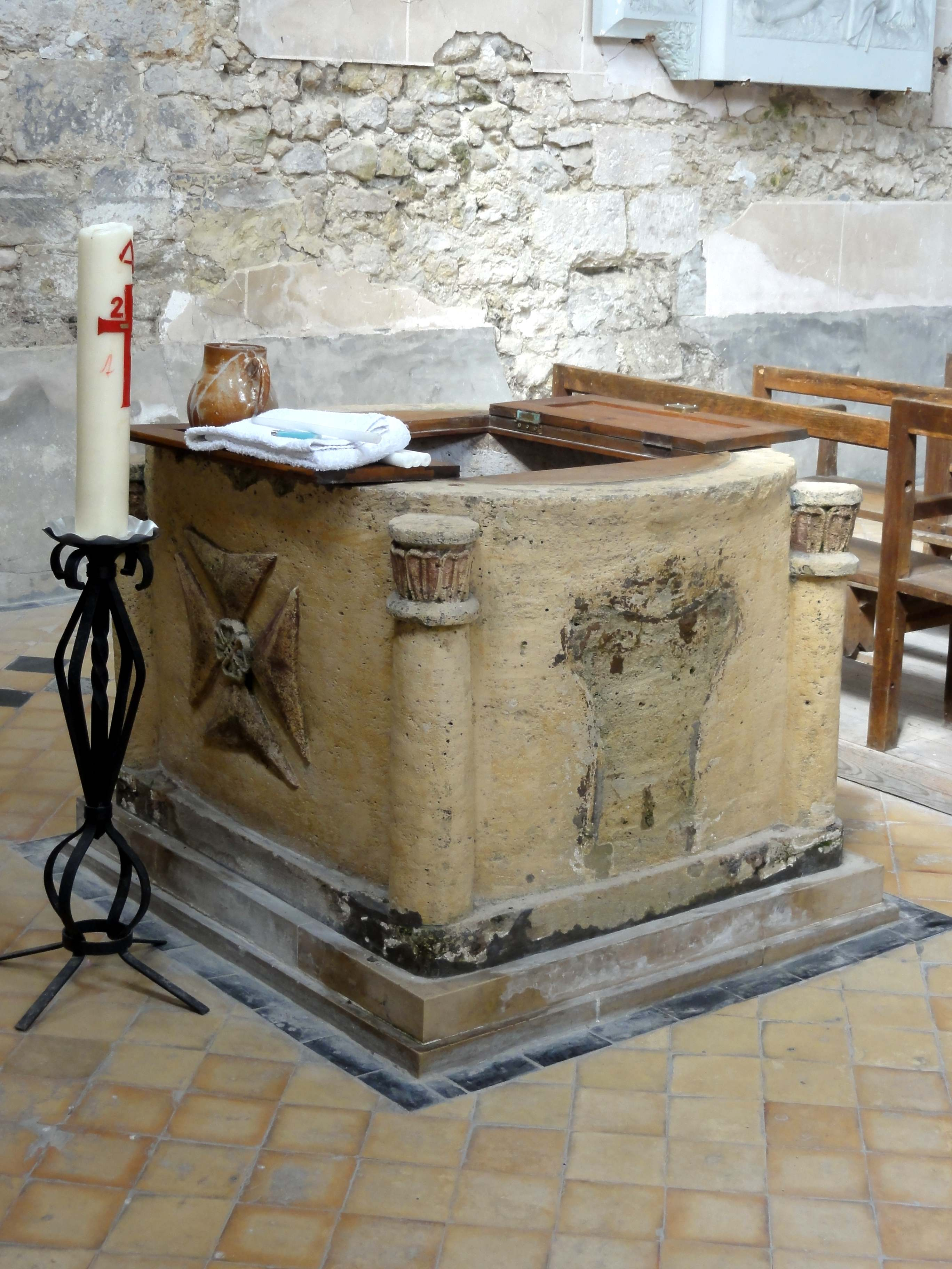 Mobilier de l'église - voir titre.